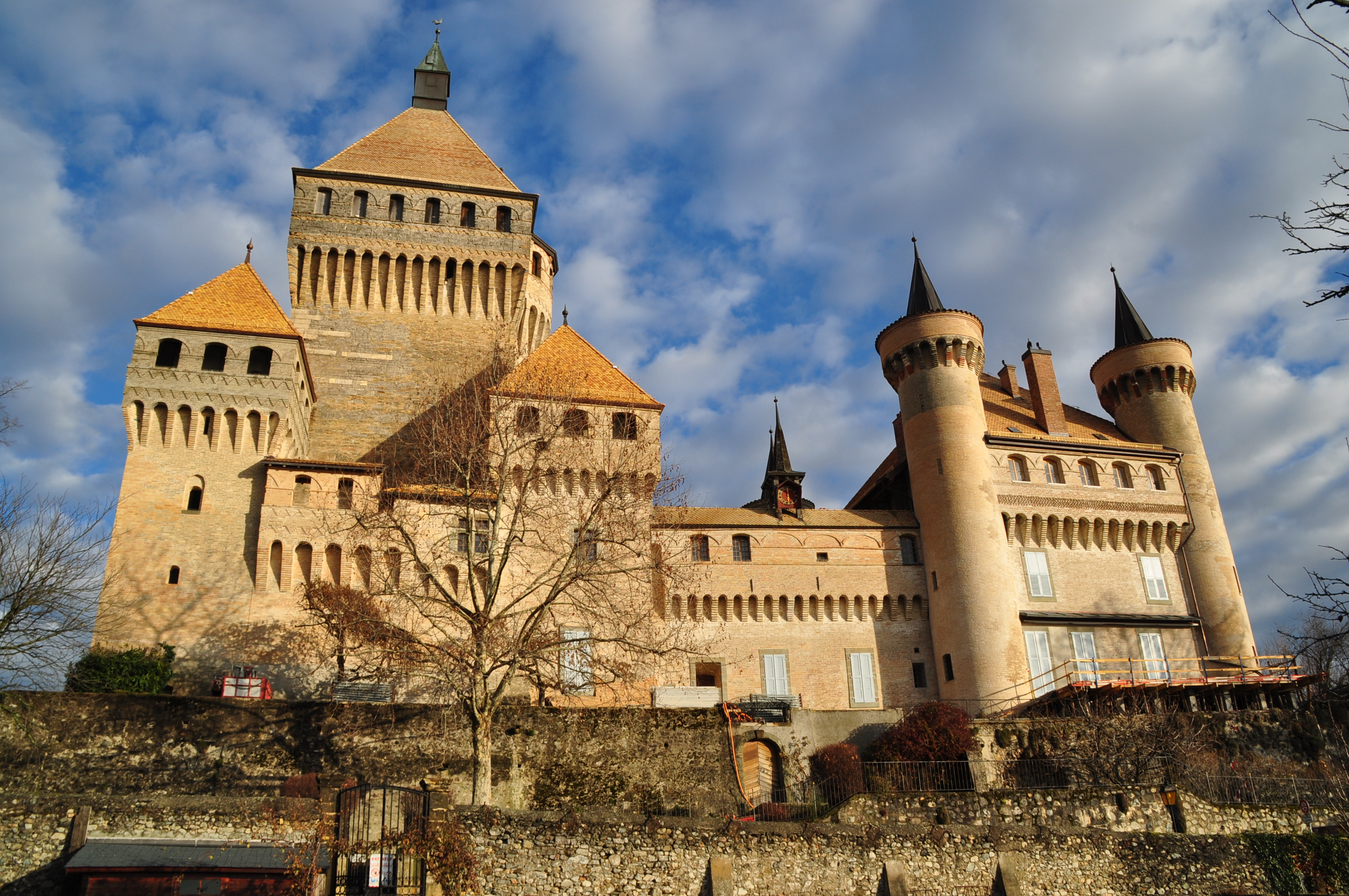 Un des plus beaux châteaux vaudois